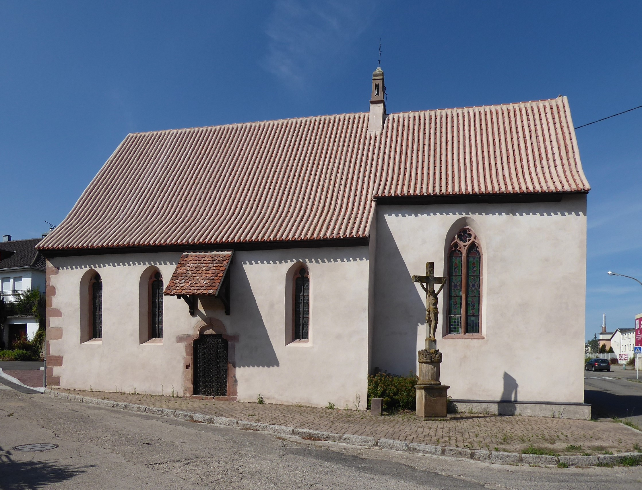 Chapelle Saint-Jean de Dambach-la-Ville